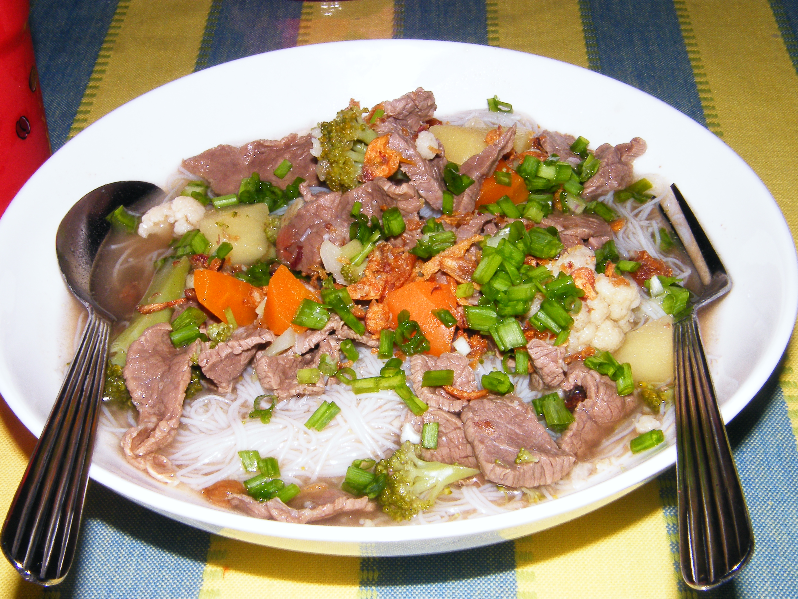 Bihun sup